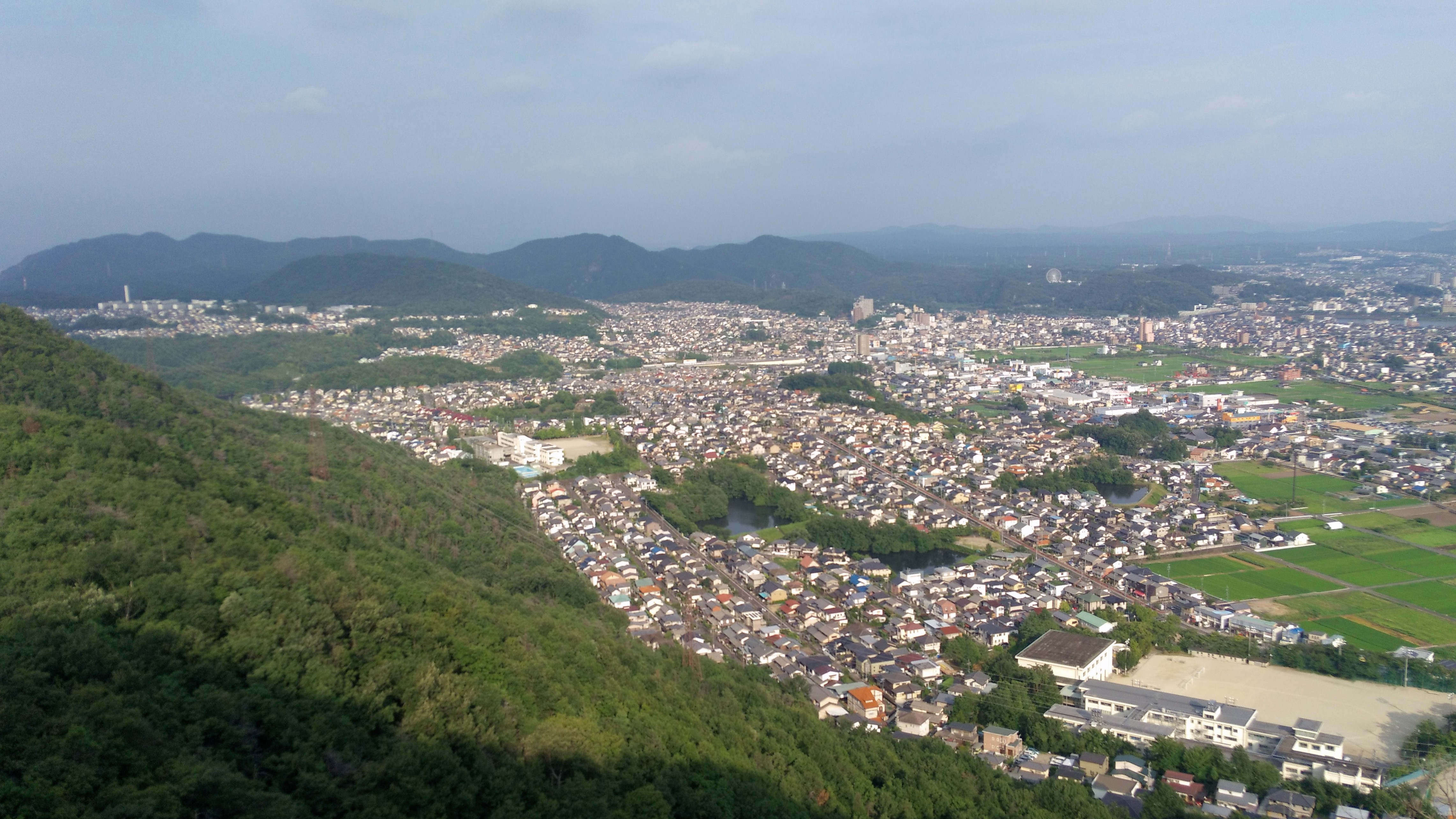 岐阜県各務原市鵜沼の団地群（ 松が丘（日本ラインネオポリス）・つつじヶ丘（興人鵜沼団地）および緑苑（名鉄緑苑団地）・鵜沼台（鵜沼台団地）・新鵜沼台（日本ライン新鵜沼台））の遠景